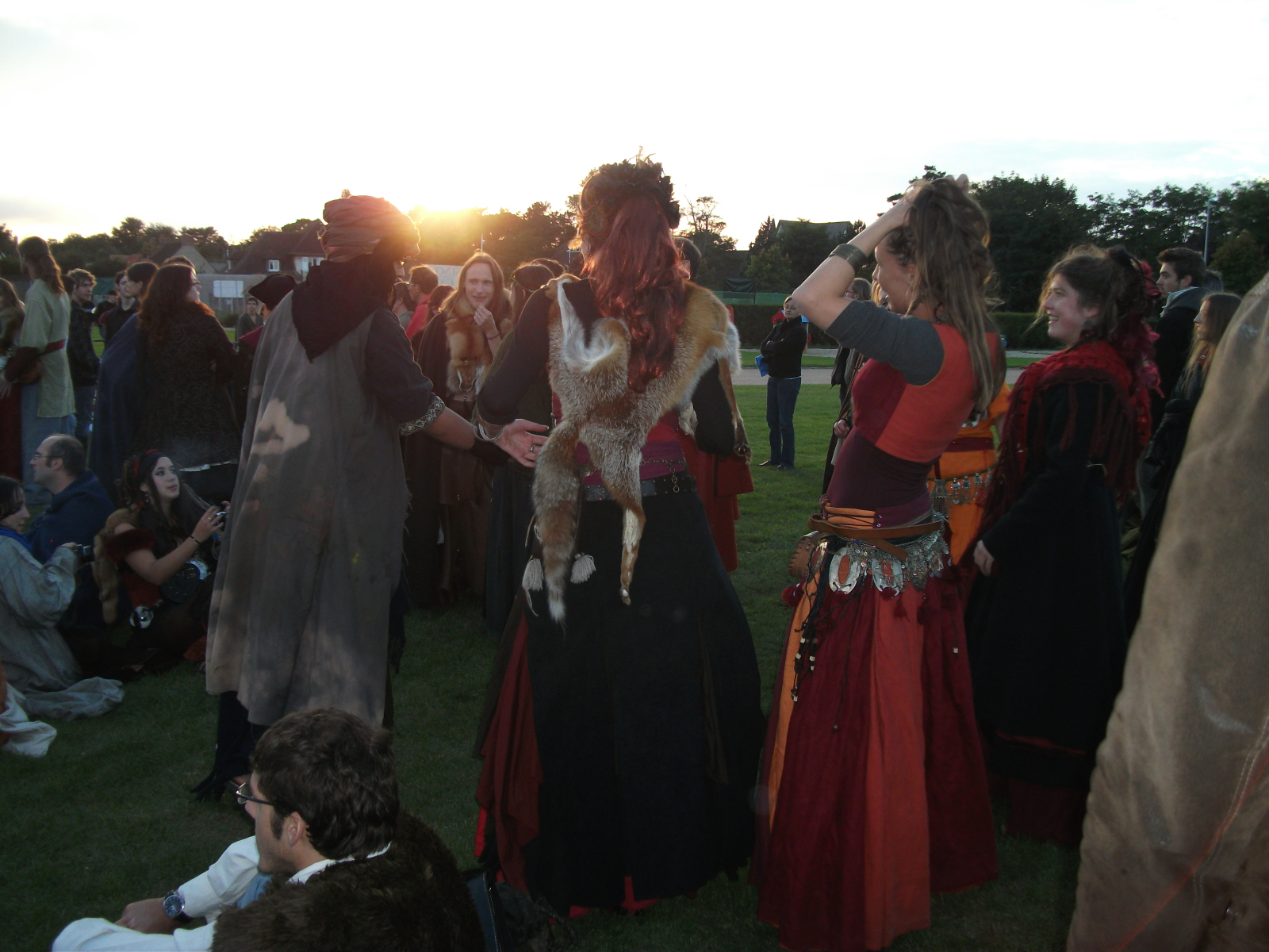 Festivaliers dansant durant le concert de Stille Volk, à Cidre et Dragon (Normandie, France).